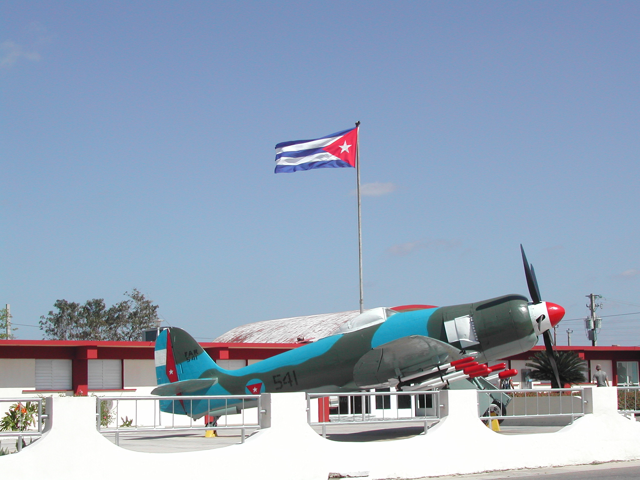 Museo_de_la_Intervención_zu_Kuba,_Playa_Girón